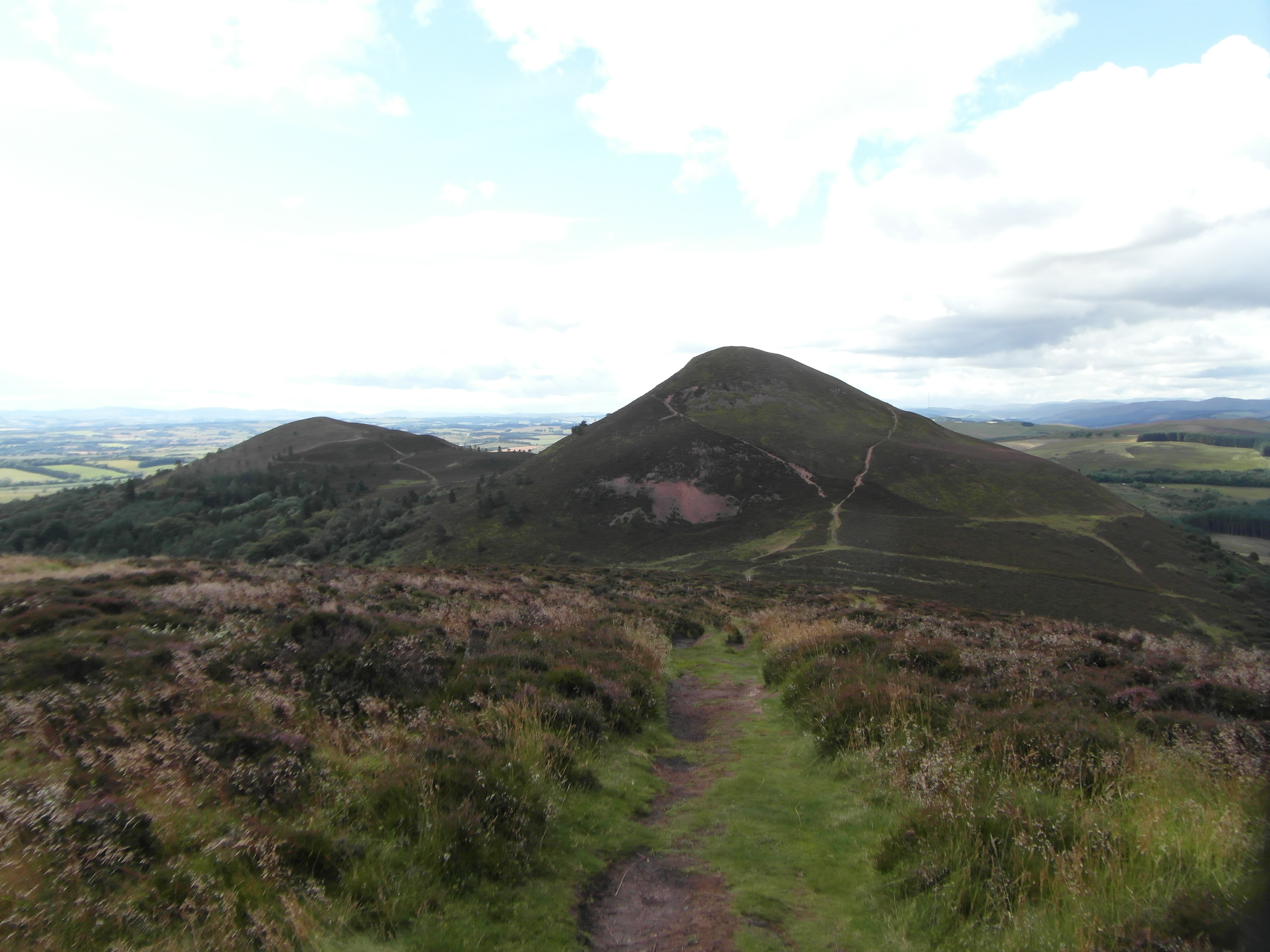 Eildon Hills, Melrose, Scotland